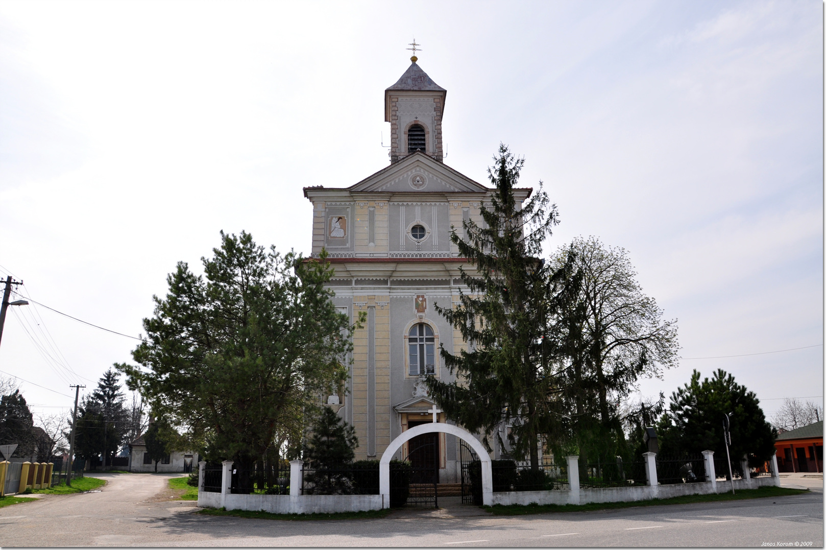 Jahodná, rím. kat. kostol sv. Petra a Pavla